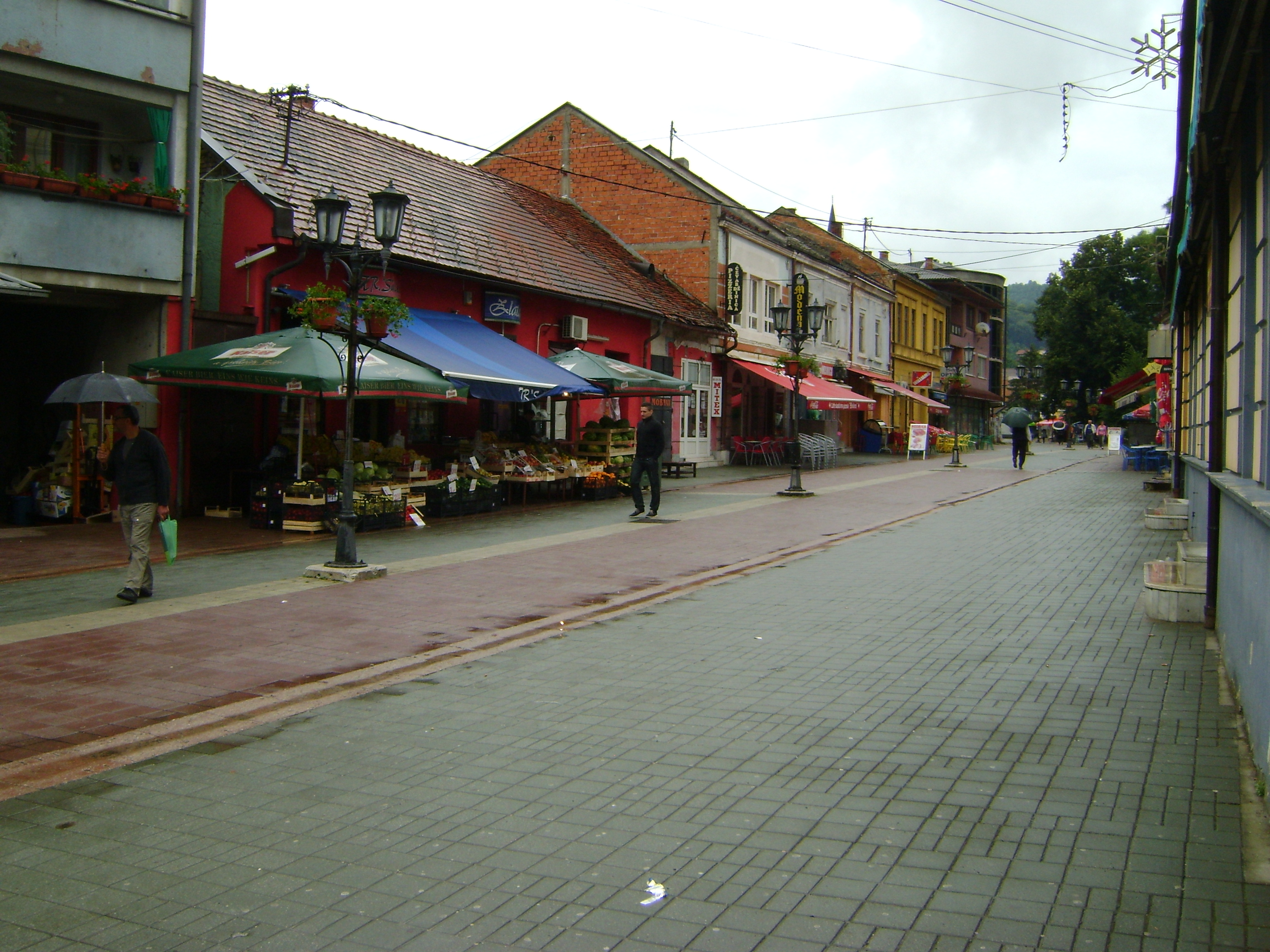 Pogled trga ali Čaršije - glavne ulice imenovane ulica Alije Izetbegovića v Gračanici.